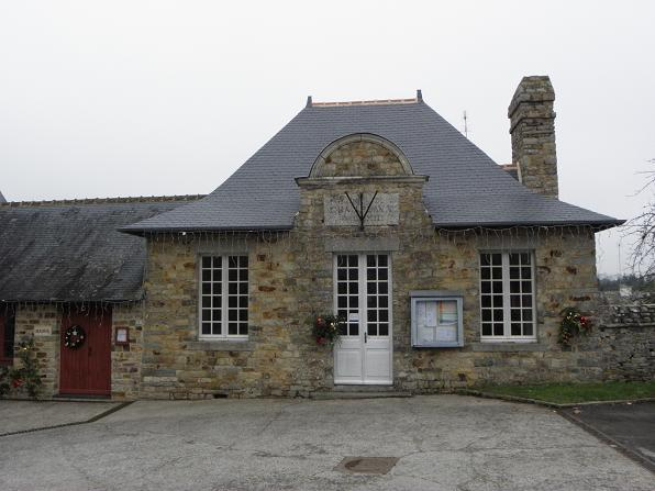 Mairie de Champeaux (35).